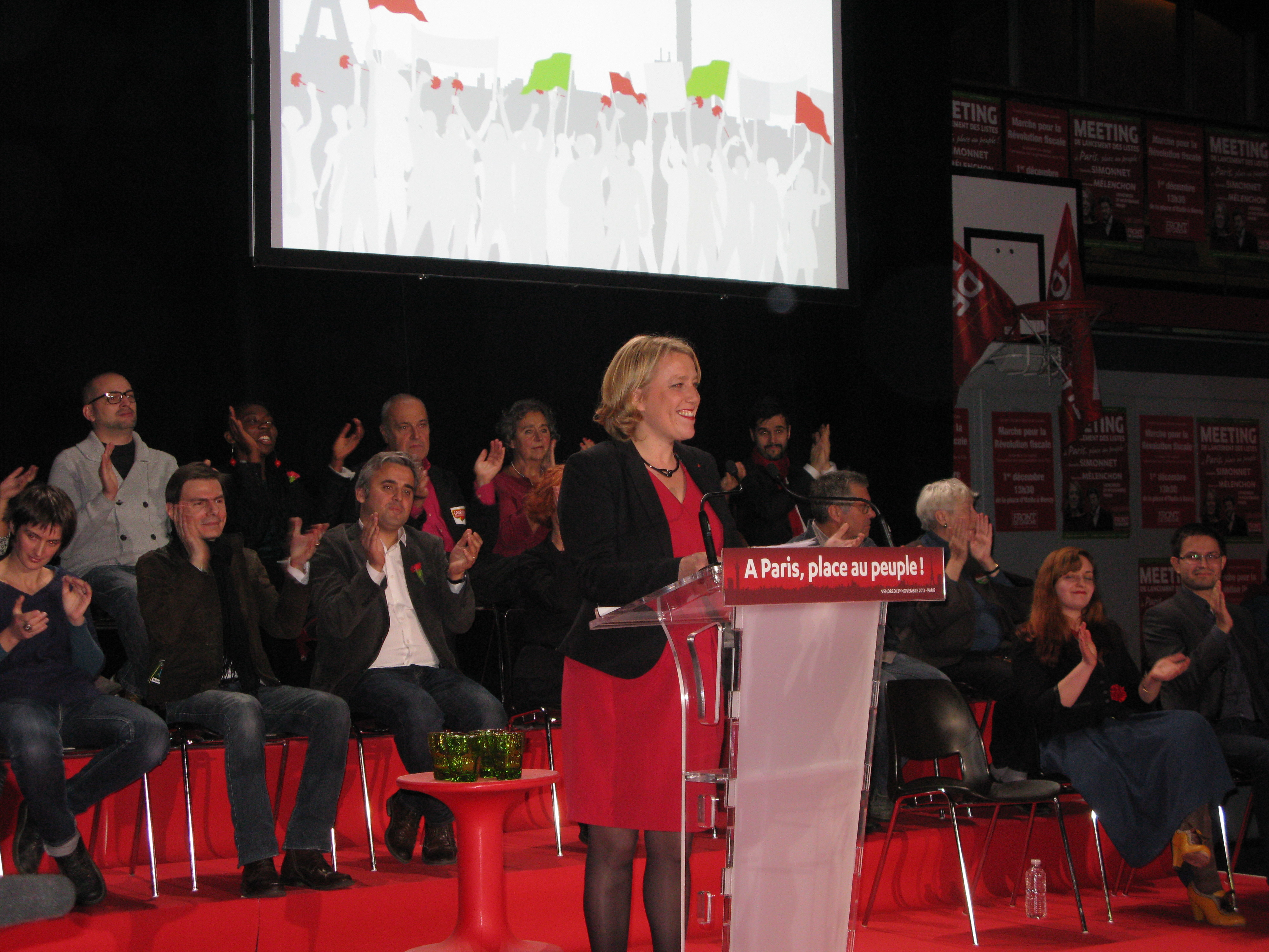 Danielle Simonnet à Paris, lors du lancement de la campagne des municipales 2014 du Front de gauche parisien.